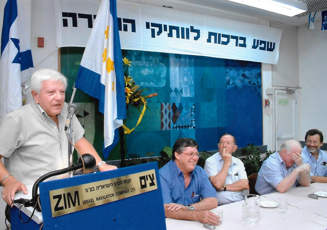 מריאנסקי מברך בשם הנימלאים בטכס יציאה לנמלאות מחברת צים יולי 2003